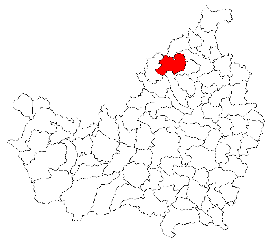 Categorie:Hărţi ale judeţului Cluj